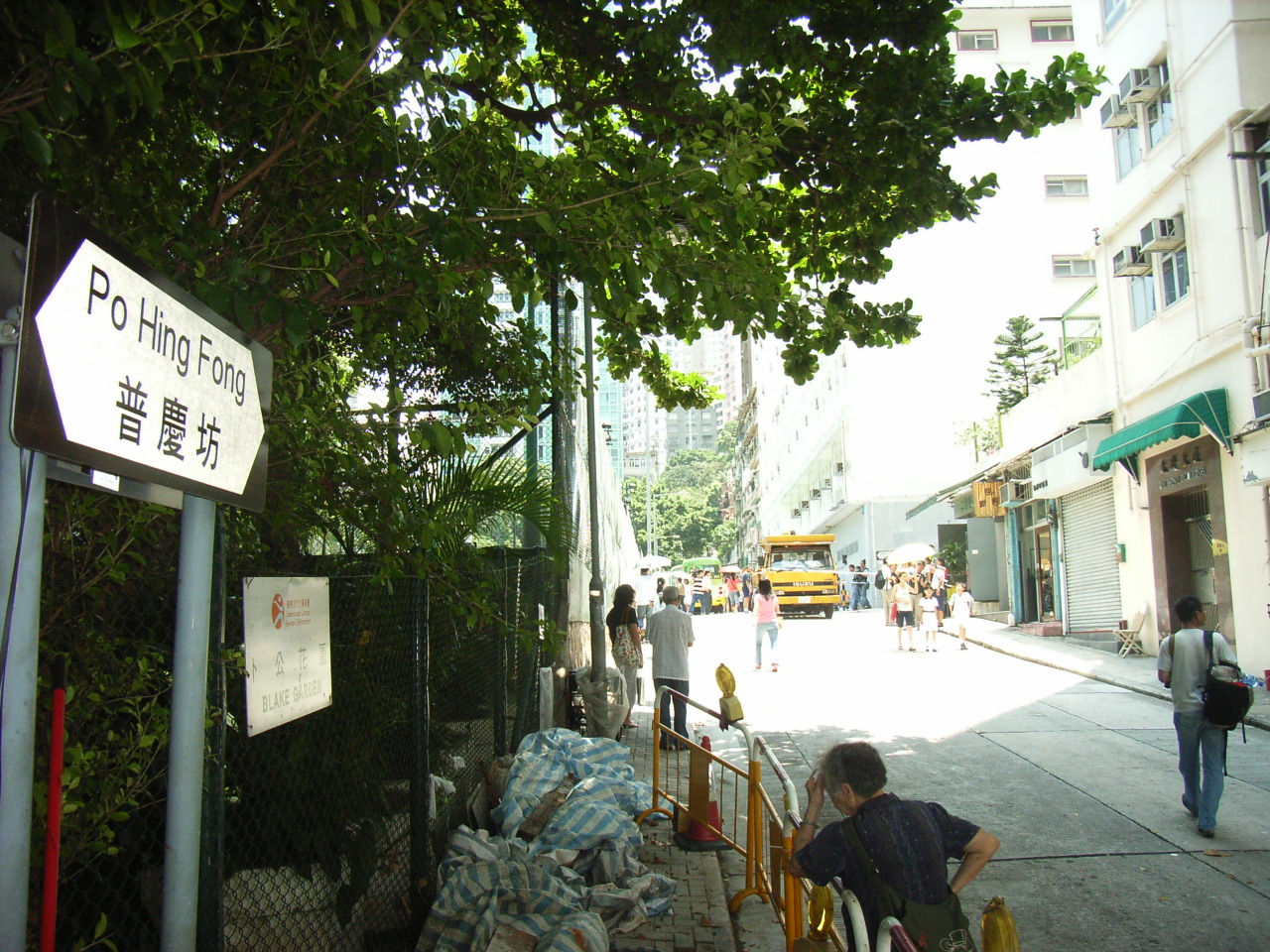 普慶坊, Po Hing Fong, Sheung Wan, Hong Kong - by Papa mimi